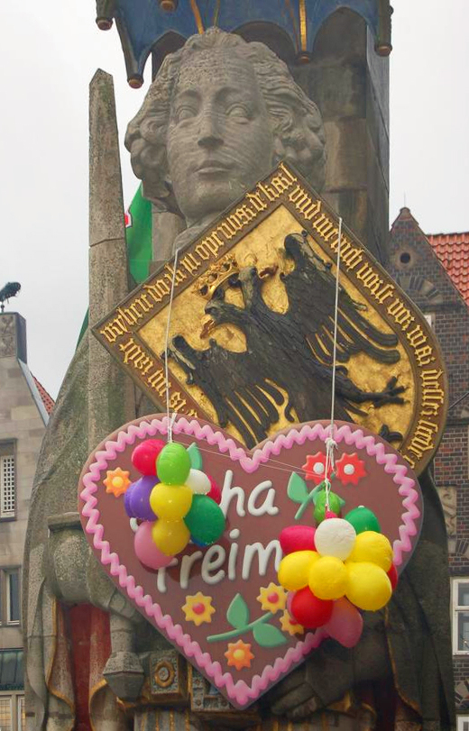 Der Bremer Roland auf dem Marktplatz in Bremen, Deutschland; mit dem traditionellen „Lebkuchenherz“ (aus Pappe) während des Bremer Freimarkts 2008.